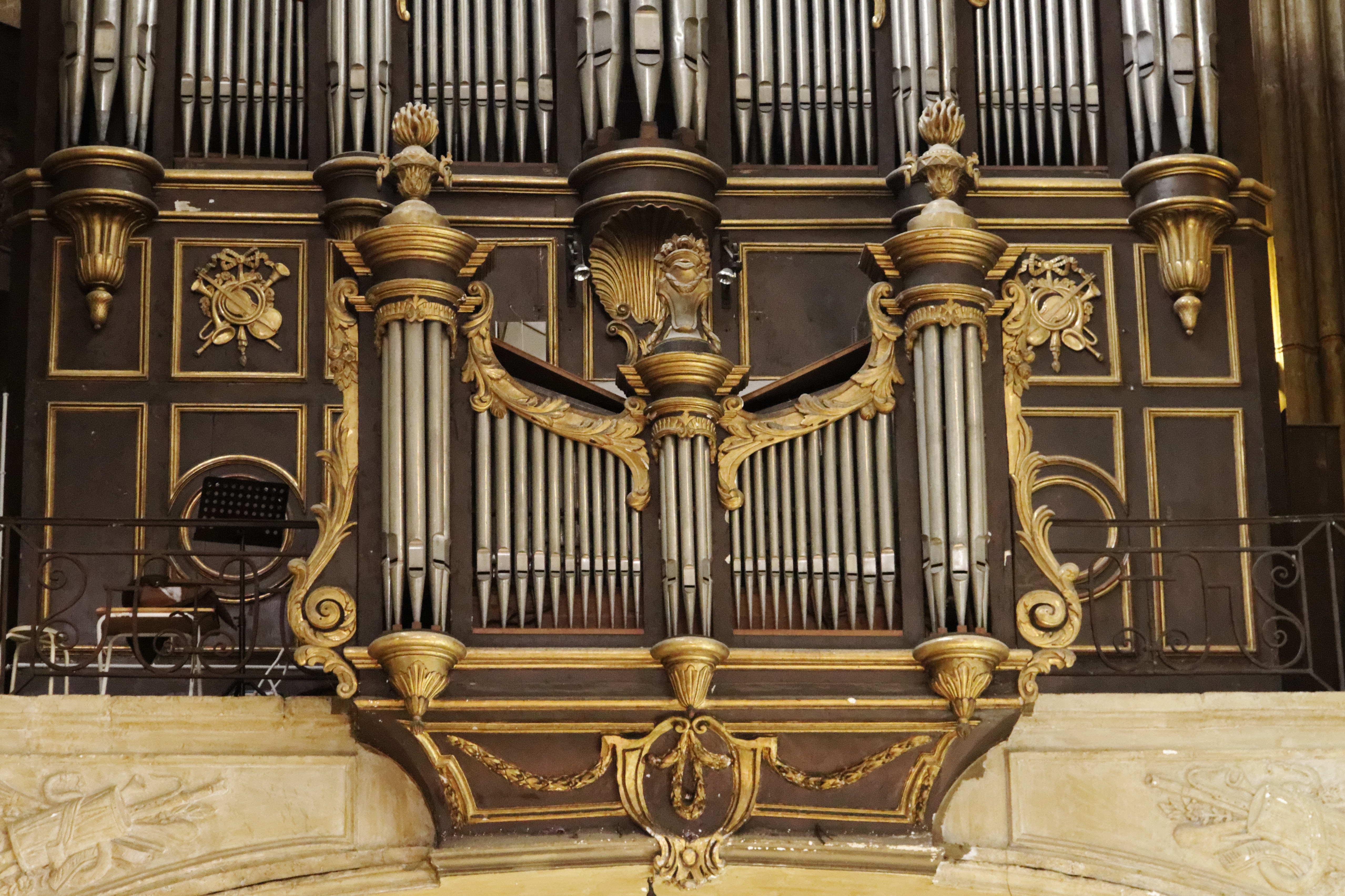 Orgue de la Cathédrale Notre-Dame de Bayonne, le positif